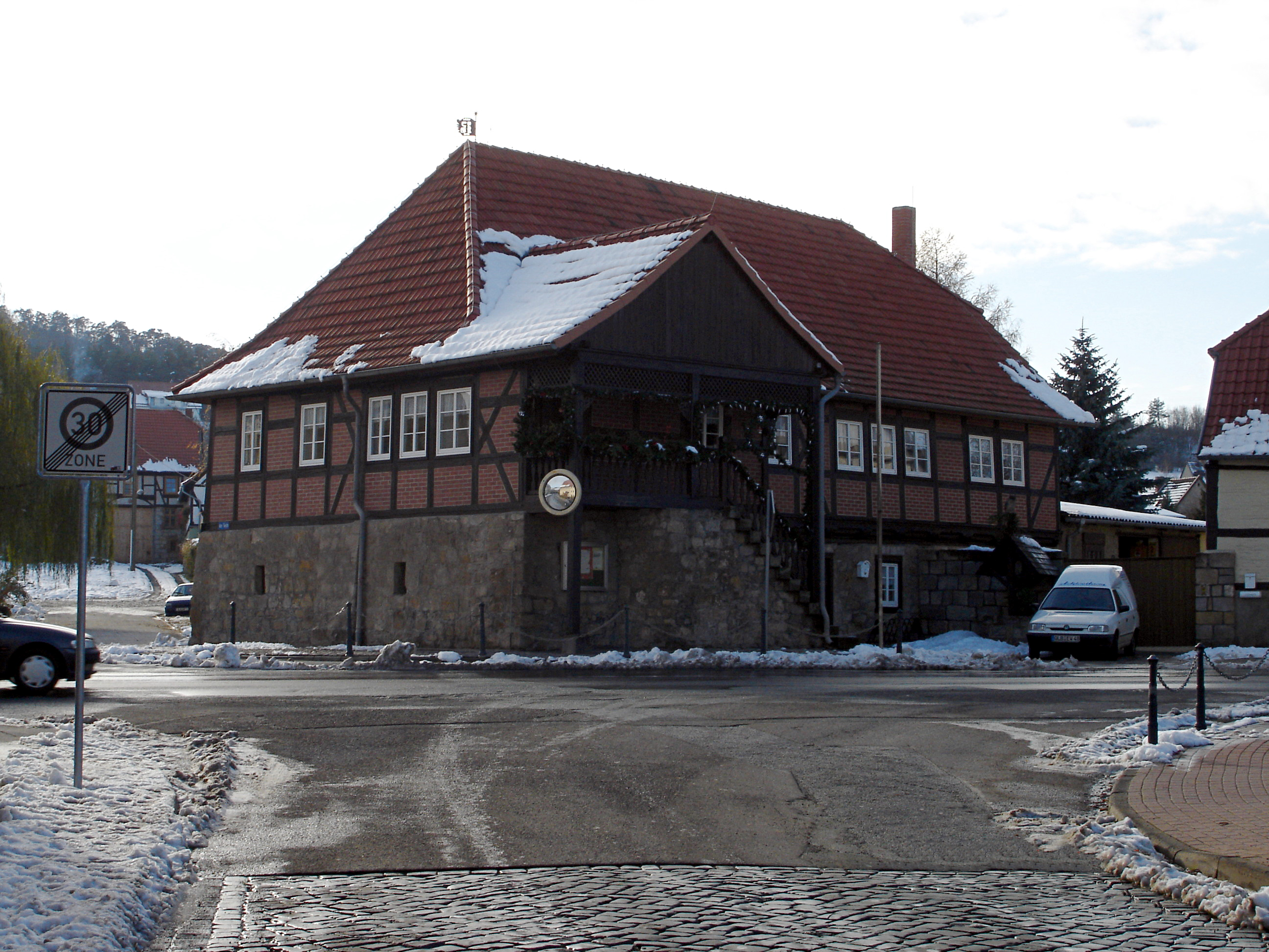 Rieder Gemeindeverwaltung